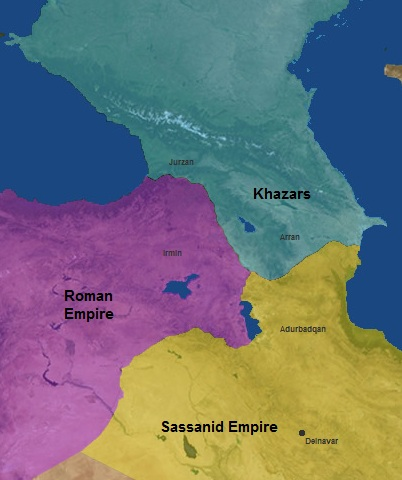 Khazars 498